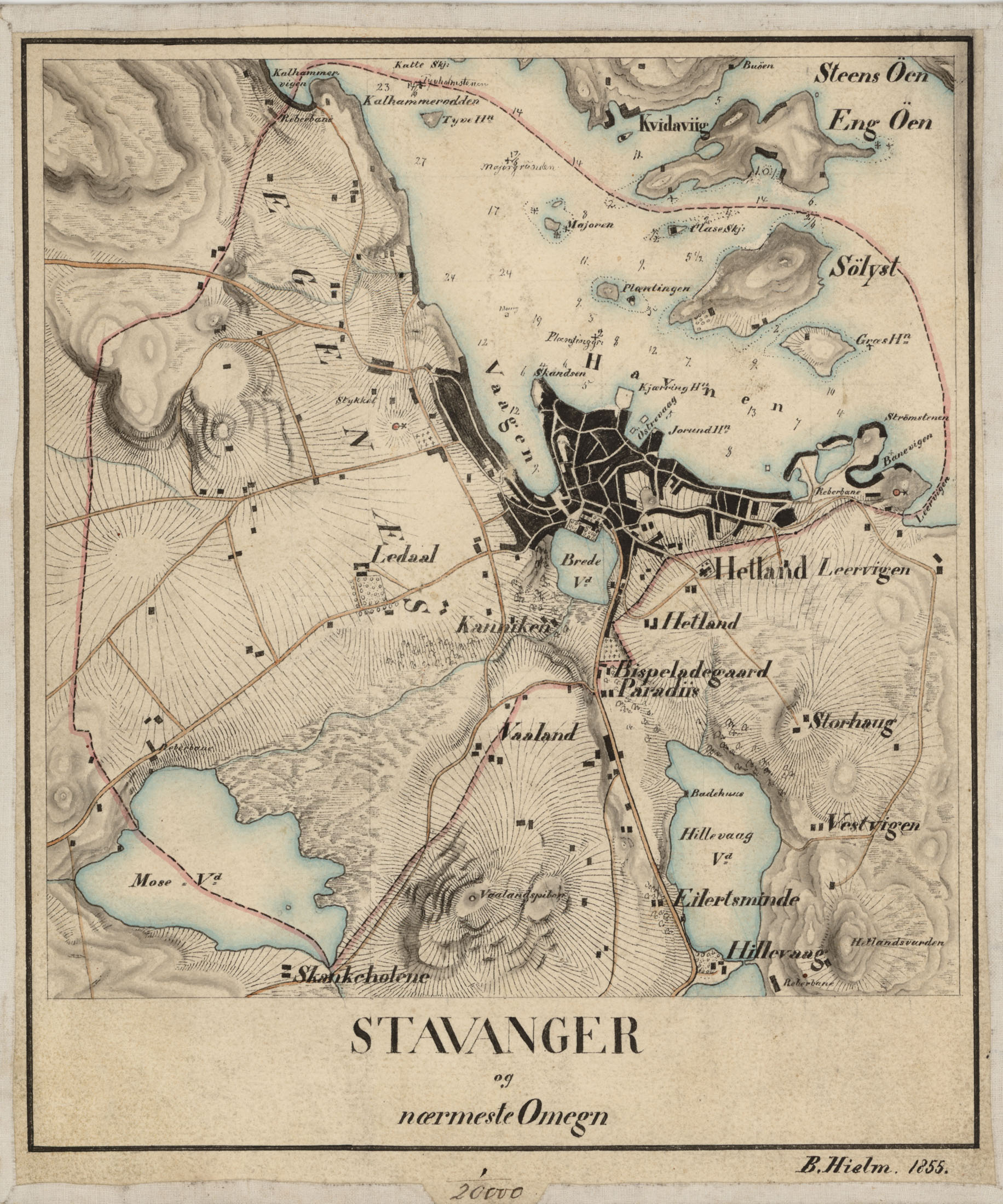 Kart over Stavanger og nærmeste Omegn. Optaget for Norges geografiske Opmåling.